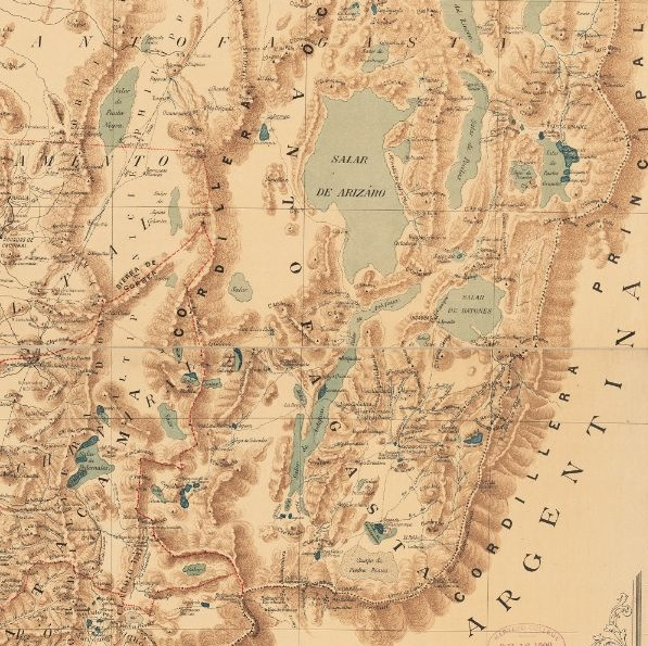 Detalle de Antofagasta de la Sierra en 1892, según mapa del ingeniero es: Francisco J. San Román